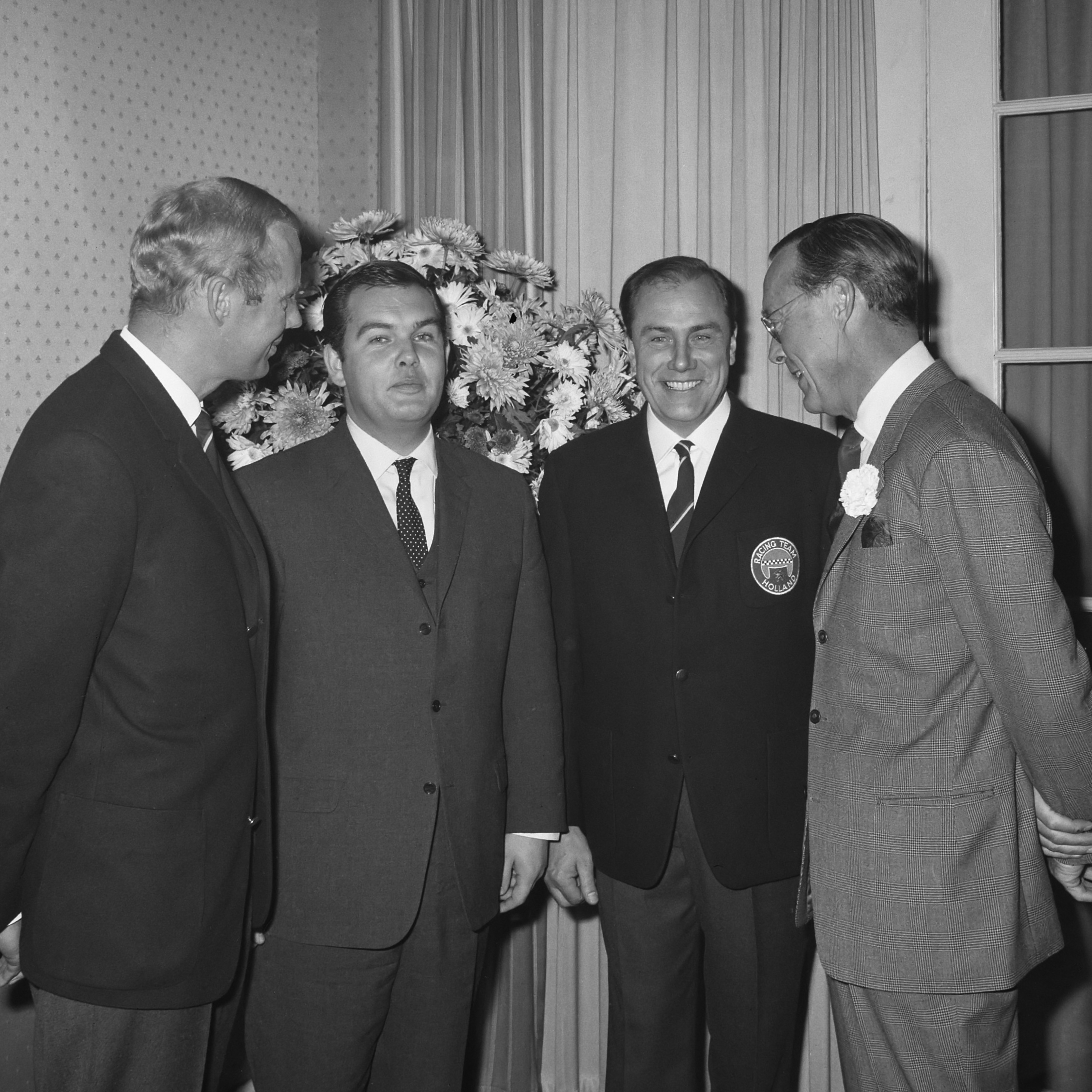 Racingteam Holland, Prins Bernhard bij lunch, v.l.n.r. heren Slotemaker, Pon en Van Salingen en Prins Bernhard 17 december 1964